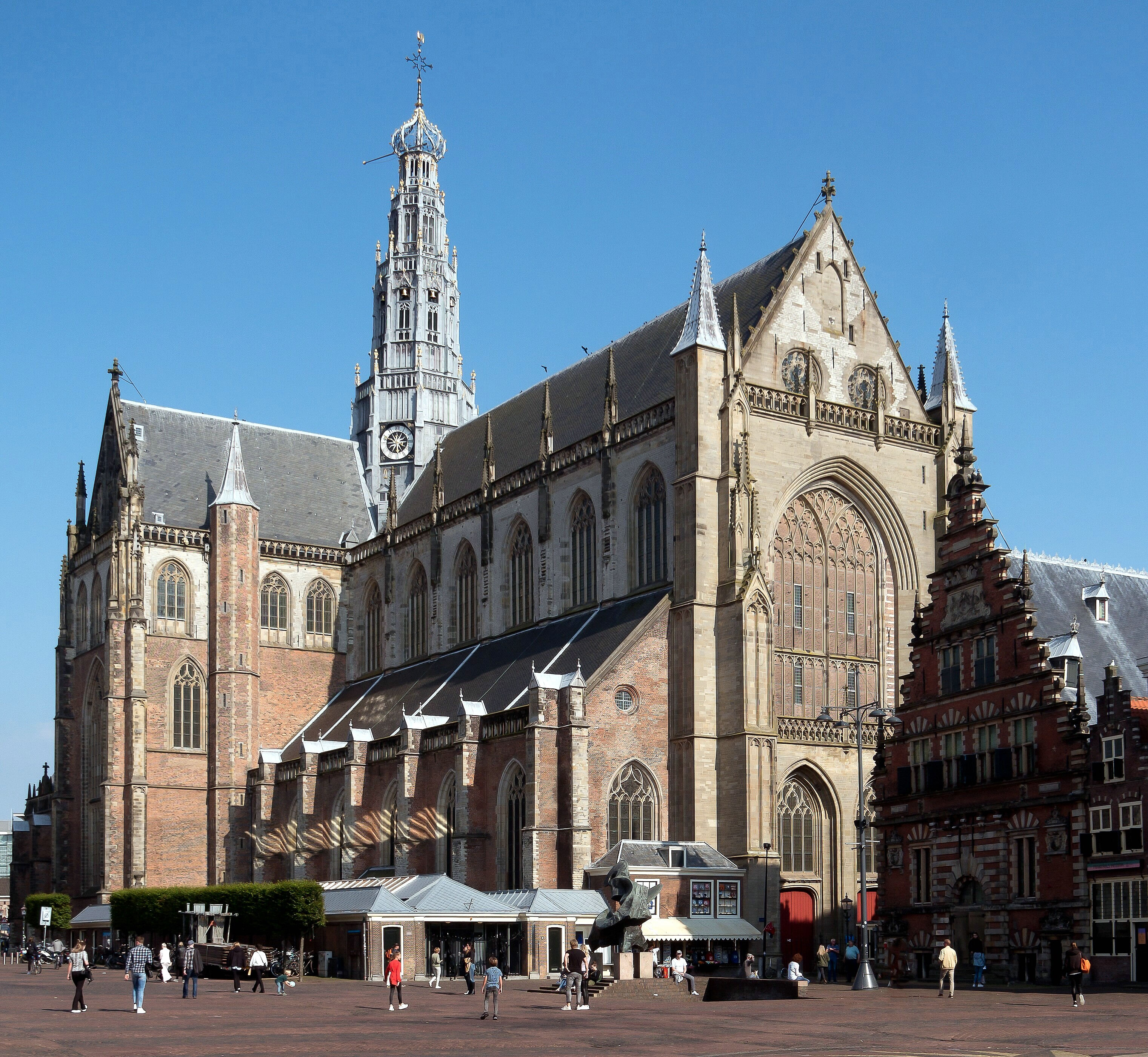 Die spätgotische St.-Bavo-Kirche in Haarlem